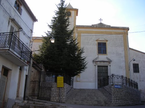 Parrocchia Santissima Annunziata, nota come Patret per l'ex convento attiguo. Piana degli Albanesi, Palermo, Sicilia, IT.